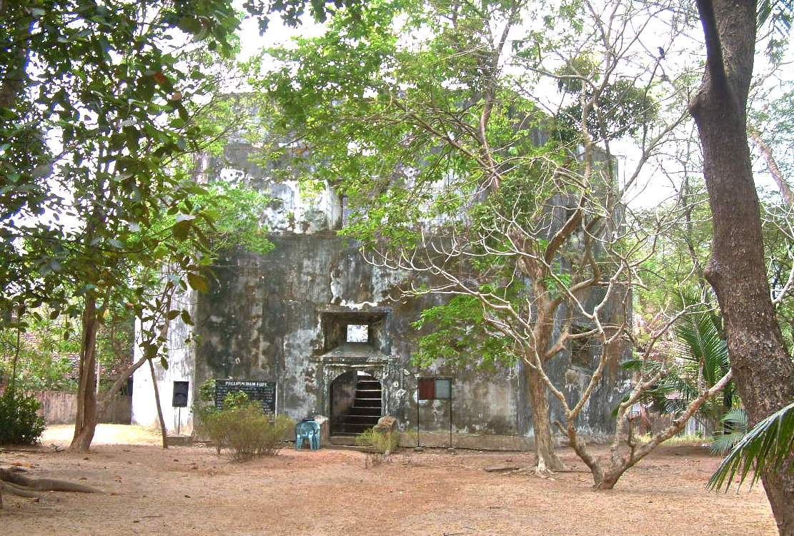 പള്ളിപ്പുറം കോട്ട ( അയീക്കോട്ട)